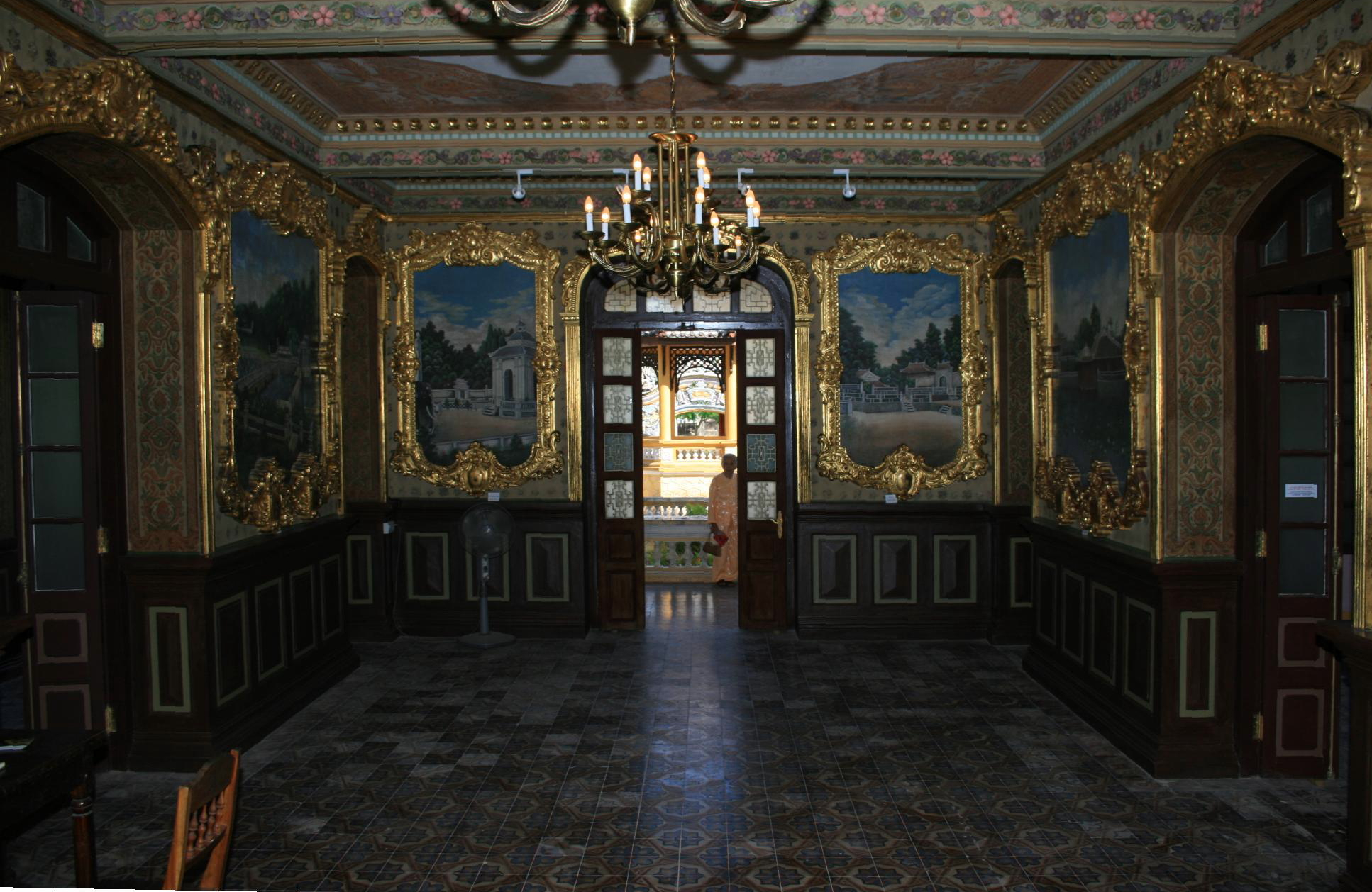 Tranh tường Cung An Định.